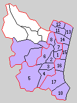 後の宮崎県宮崎郡域の町村制時点の町村。